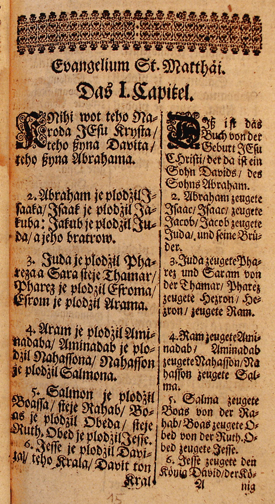 Hornjoserbsce: Započatk sćenja swj. Mateja z Noweho Zakonja w přełožku Michała Frencla 1706.